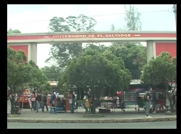 Universidad ues